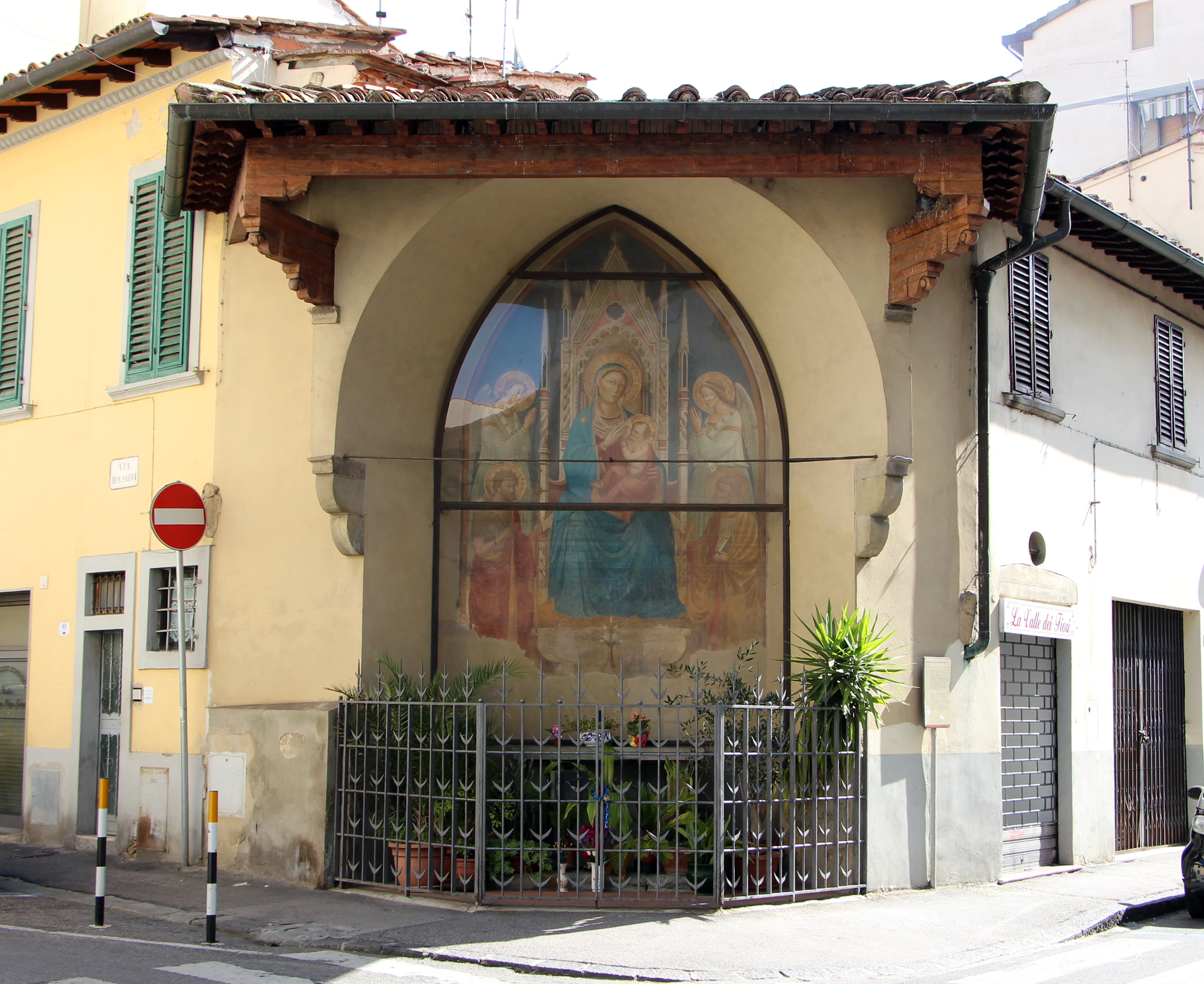 Firenze, vari siti (vedi filename e categorie)